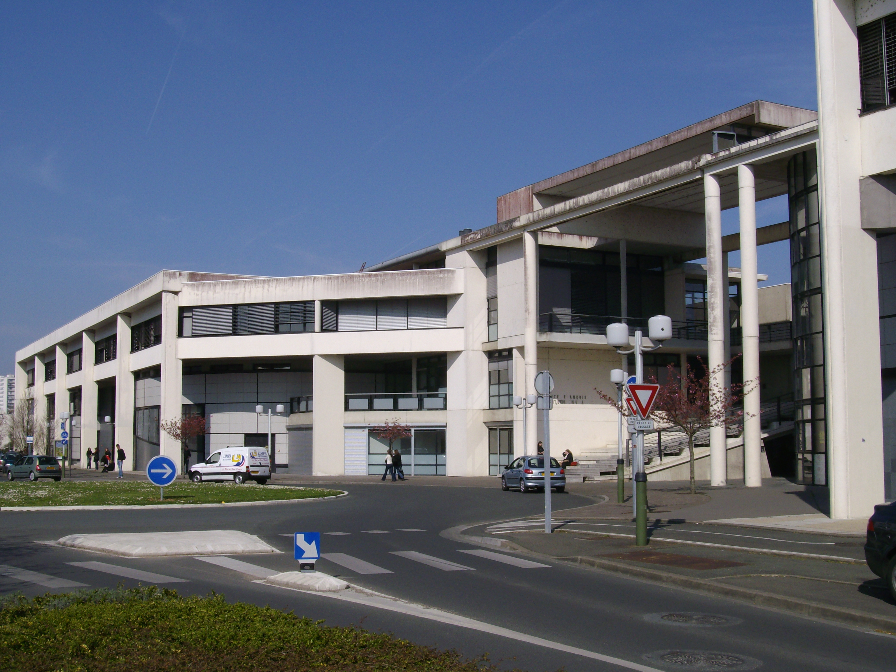 Le bâtiment B du site Portalis sur le campus des Deux-Lions - Université de Tours.